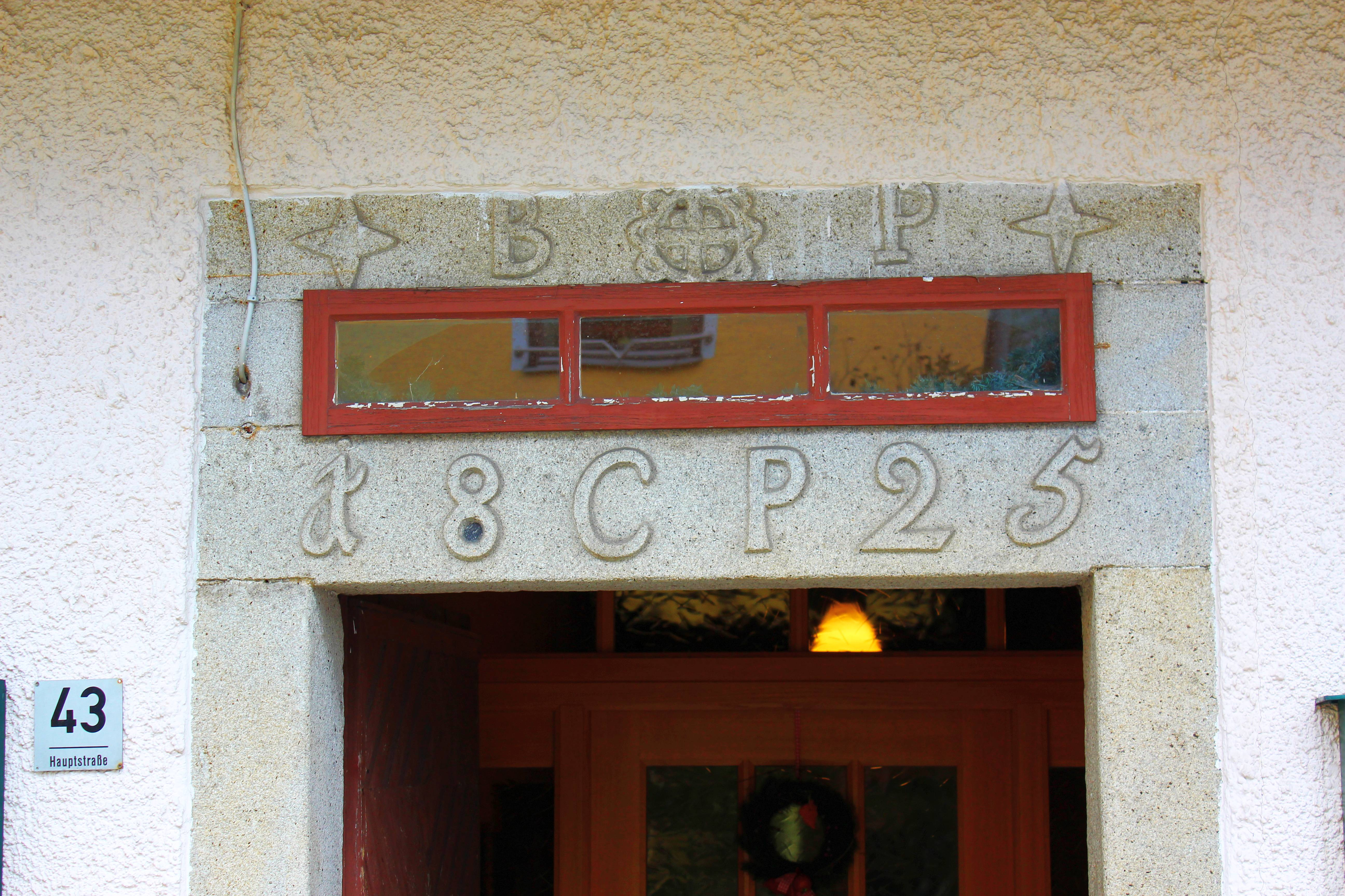 Türstock am Gasthof Zur Alten Post Herzogsreut)